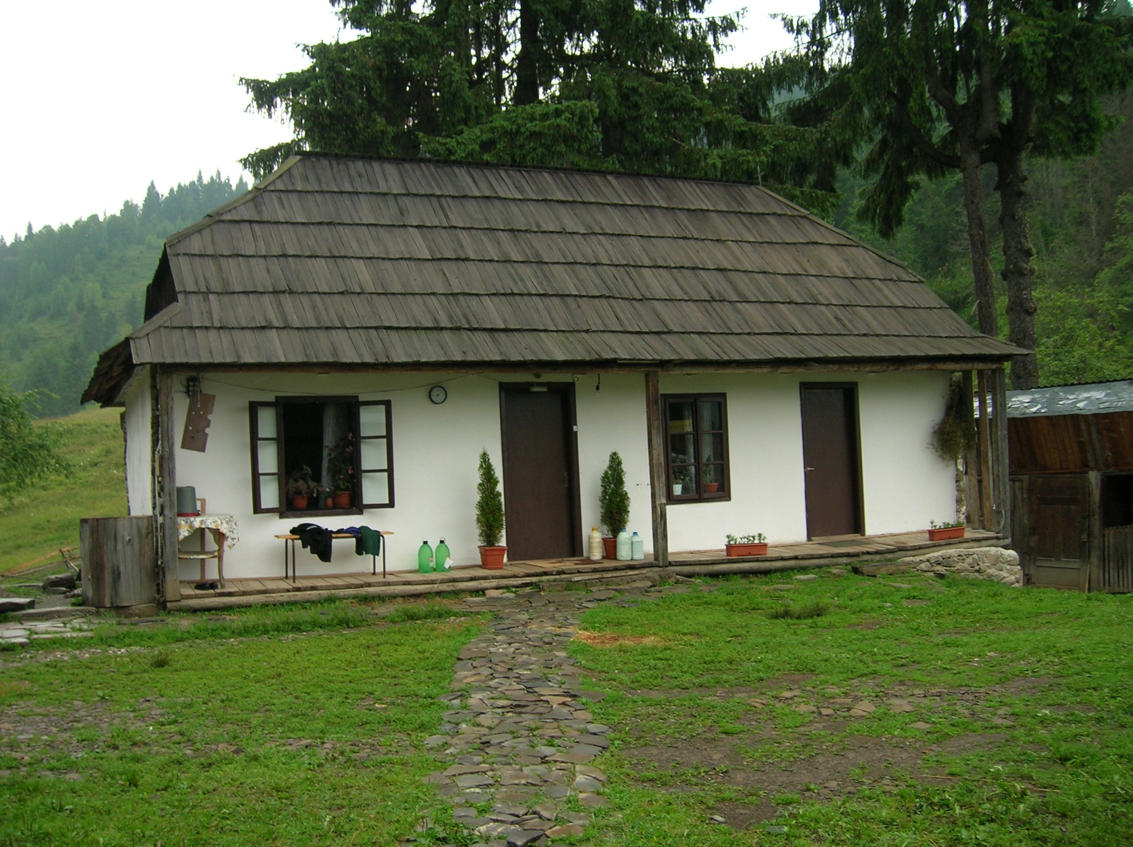 Trapeza mănăstirii (situată pe valea afluentului Tarcăului numit Tărcuţa) este într-o clădire restaurată, veche de peste 200 de ani